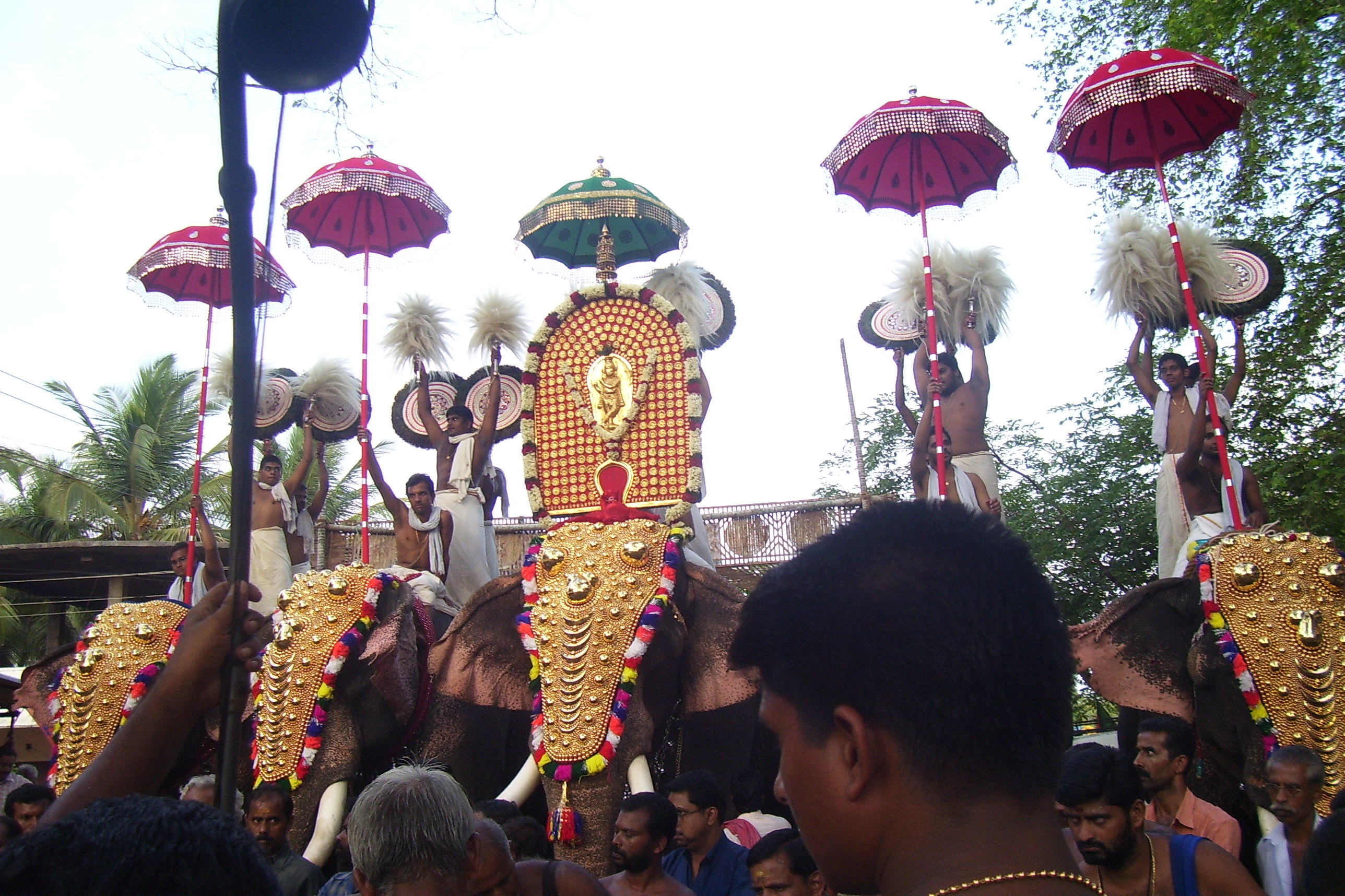 Vettekkarante Ezhunnellath